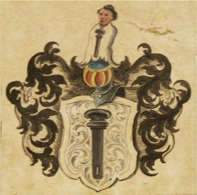 Familienwappen aus den genealogischen Registern der Stadt Schaffhausen, angelegt von Johann Ludwig Bartenschlager (1692–1773) ab 1744, 7. Band (R–S) Familie Rink von Wildenberg, Blasonierung: In Silber eine schwarze Wagenlünse.